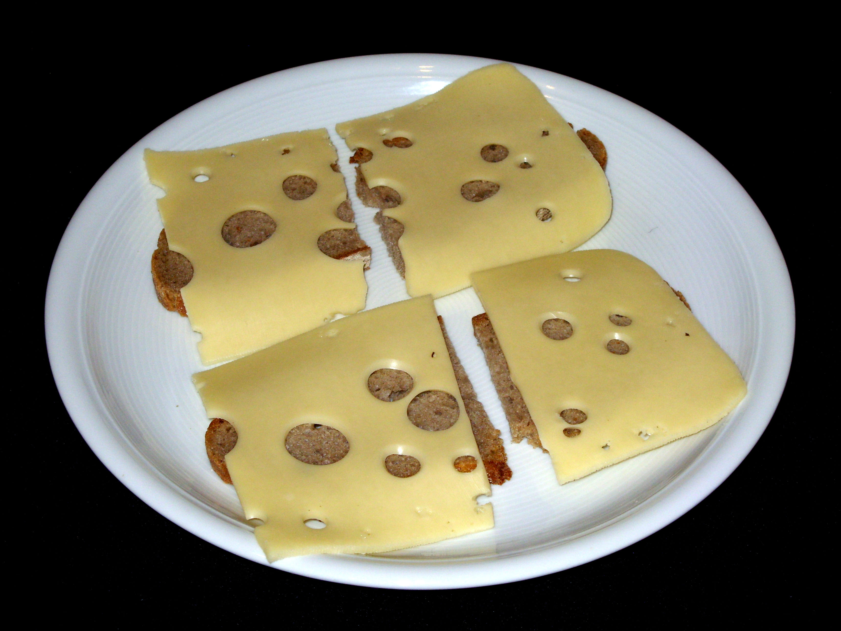 Brot mit Maasdamer Käse